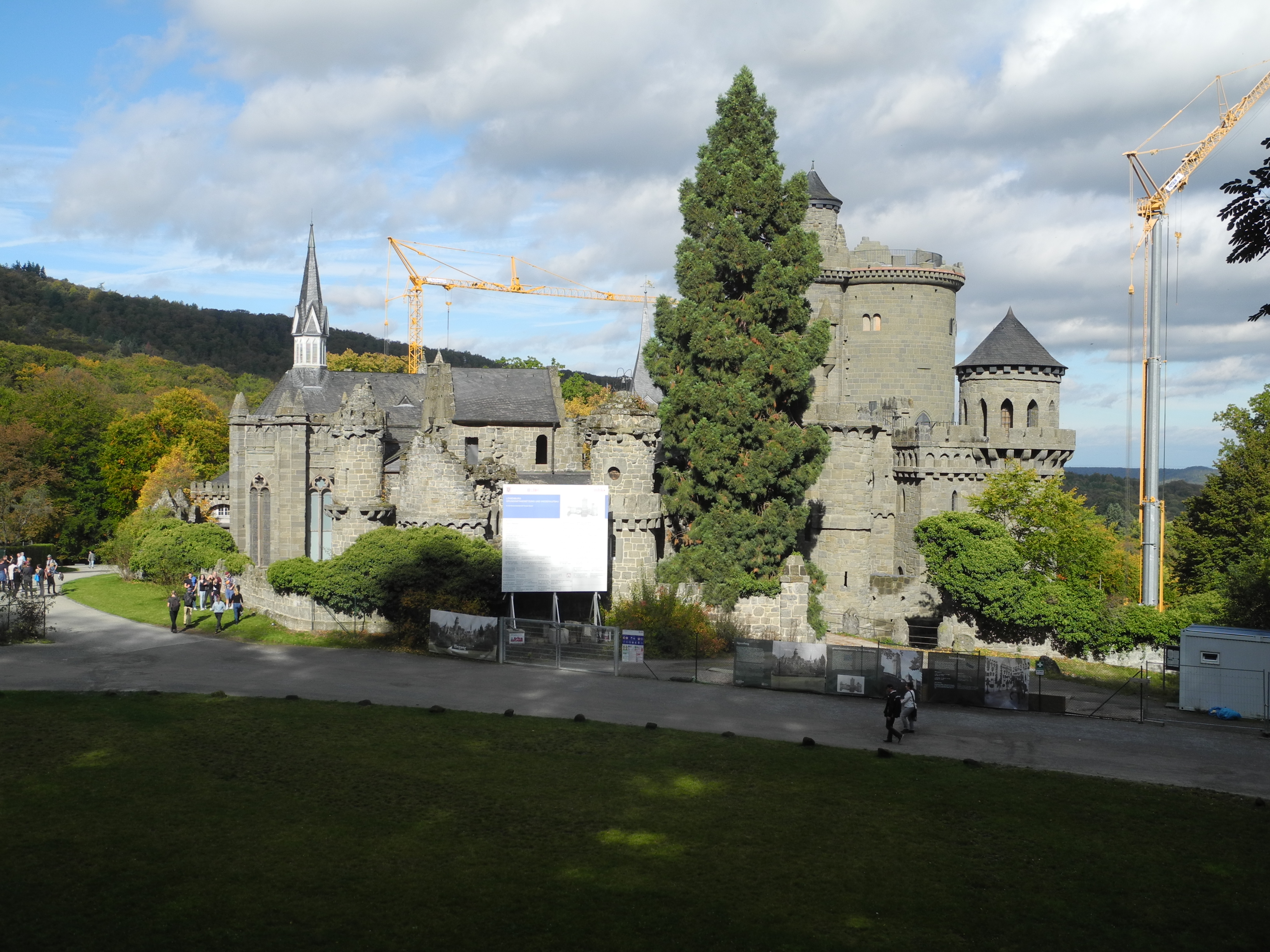 Die Löwenburg ist ein Gebäude im Bergpark Wilhelmshöhe in Kassel, Hessen, Deutschland.Erbaut 1793 - 1801 nach Plänen von Heinrich Christoph Jussow. Aufnahme während der Sanierungsarbeiten 2019.